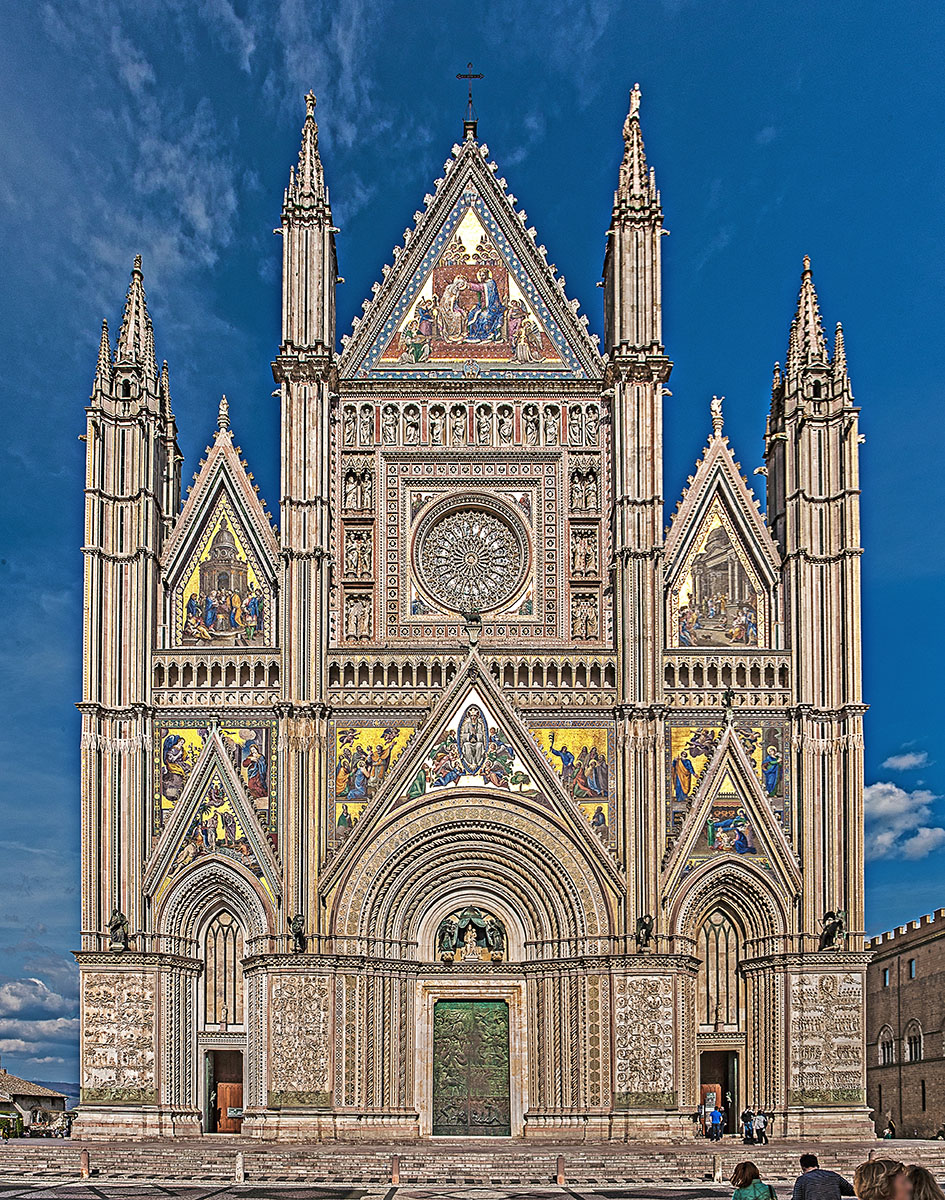 La facciata del Duomo